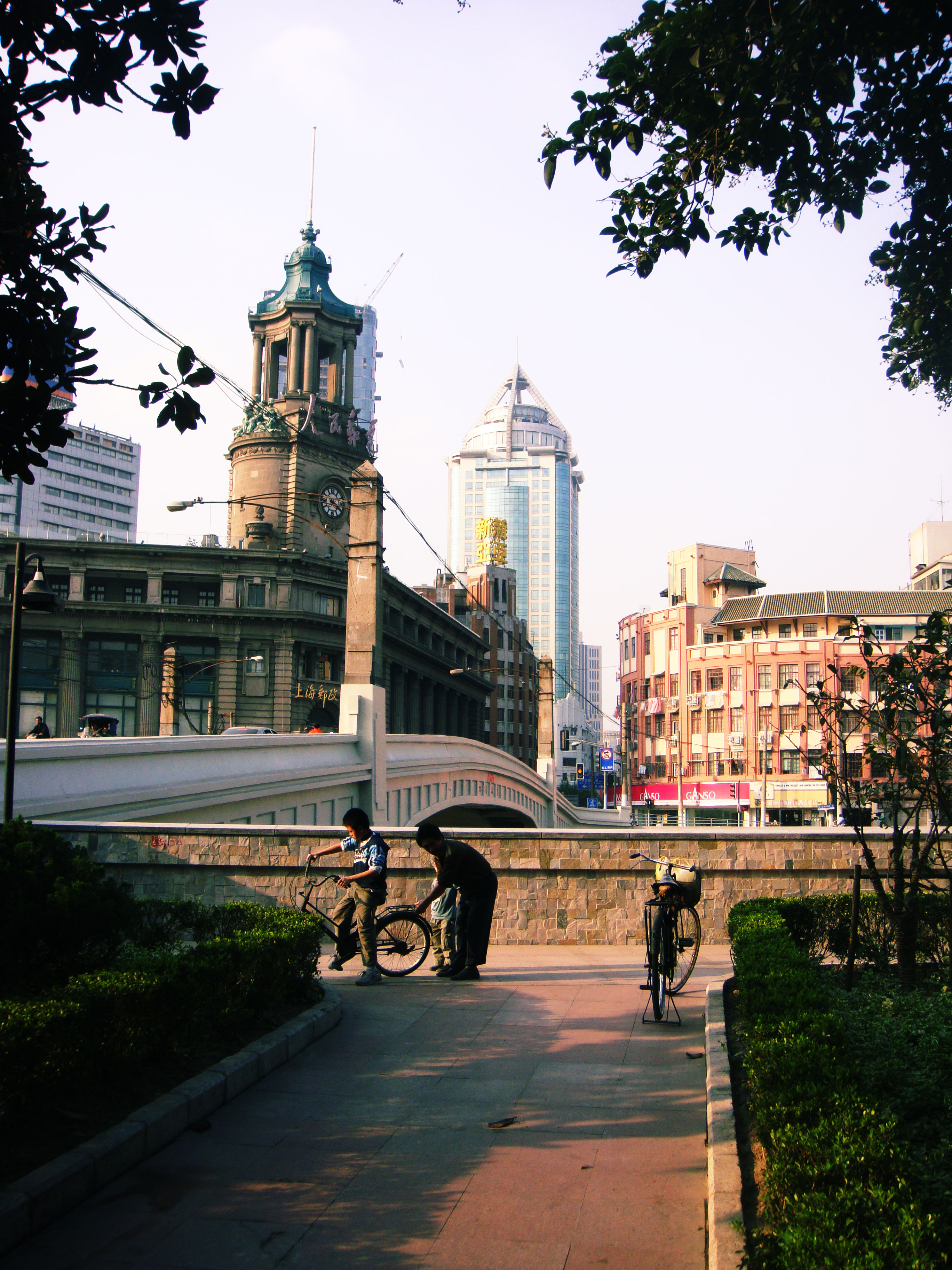 从南岸眺望上海市邮政局大楼